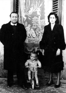 Peppino Impastato a due anni con il padre Luigi e la madre Felicia Bartolotta.